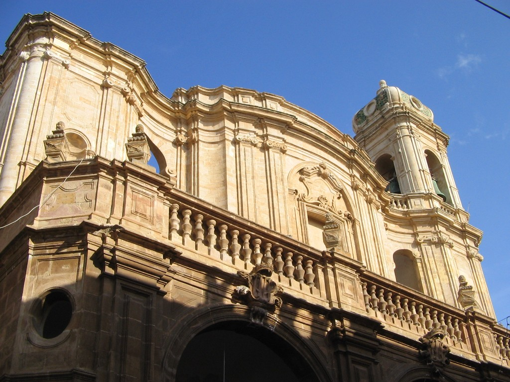 Trapani, Cattedrale di S. Lorenzo (esterno) - Foto D. Pennisi